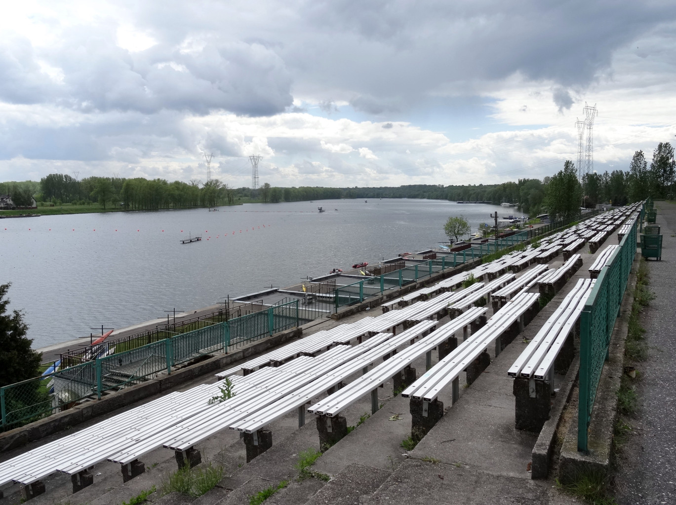 Tor regatowy w Bydgoszczy-Brdyujściu